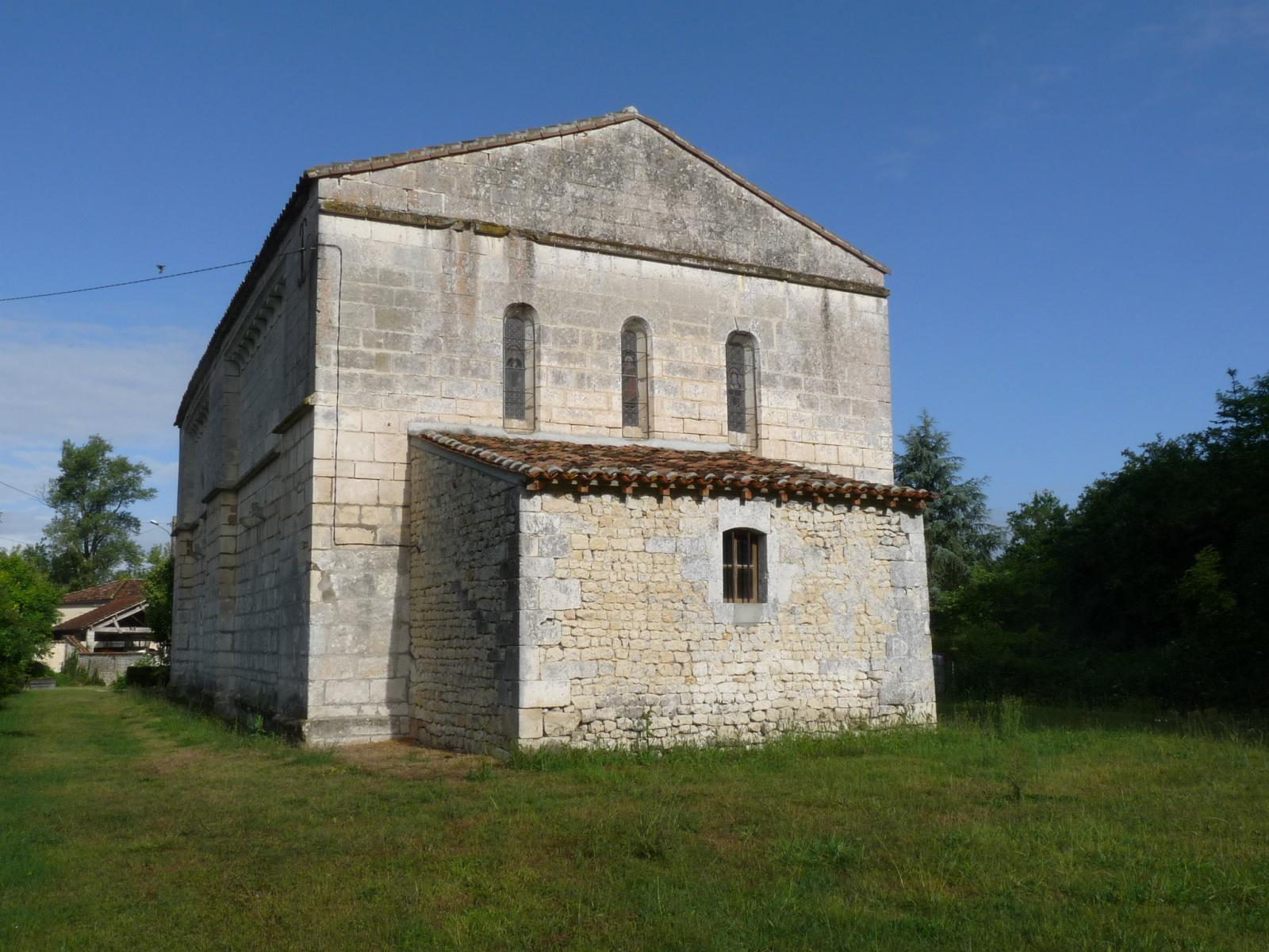 Chapelle des Templiers d'Angles, Salles-d'Angles, Charente, France